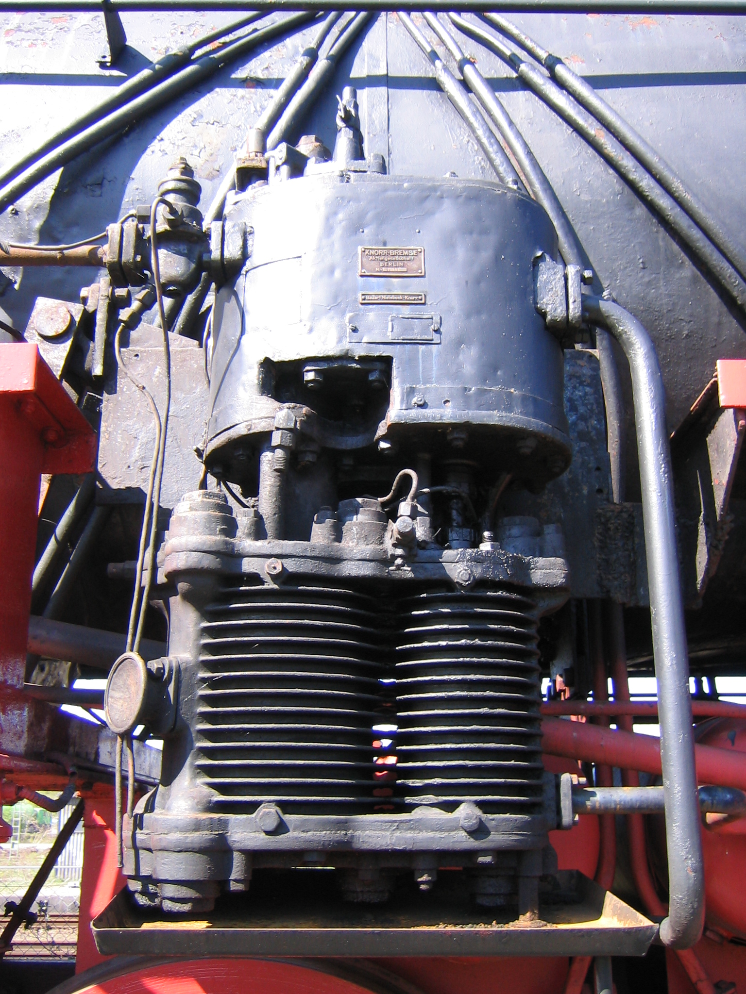 Doppelverbundluftpumpe Bauart Nielebock-Knorr im Bayerischen Eisenbahnmuseum in Nördlingen